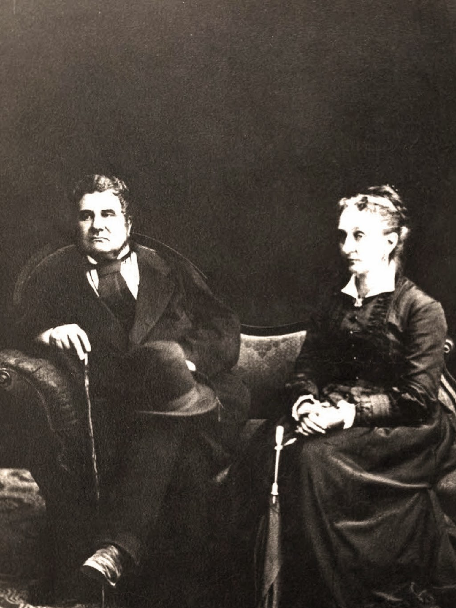 José Ignacio Larraín Landa; político chileno. Nació en Santiago en 1813. Falleció en la misma ciudad en 1892. Hijo de José Joaquín Larraín y Aguirre, heredero del Marquesado de Montepío y de Mercedes de Landa y de los Ríos. Tuvo una educación privilegiada, graduándose en 1836 como abogado de la Universidad de San Felipe. Casado con Carolina Zañartu y Larraín, con quien tuvo doce hijos. Fue, Marques de Montepio y tuvo el mayorazgo de las Propiedades del Fundo de "Lo Aguirre", la "Chacra del Manquehue" o Fundo Lo Gallo, y el Palacio Larrain Zañartu en Morande con Compañía.